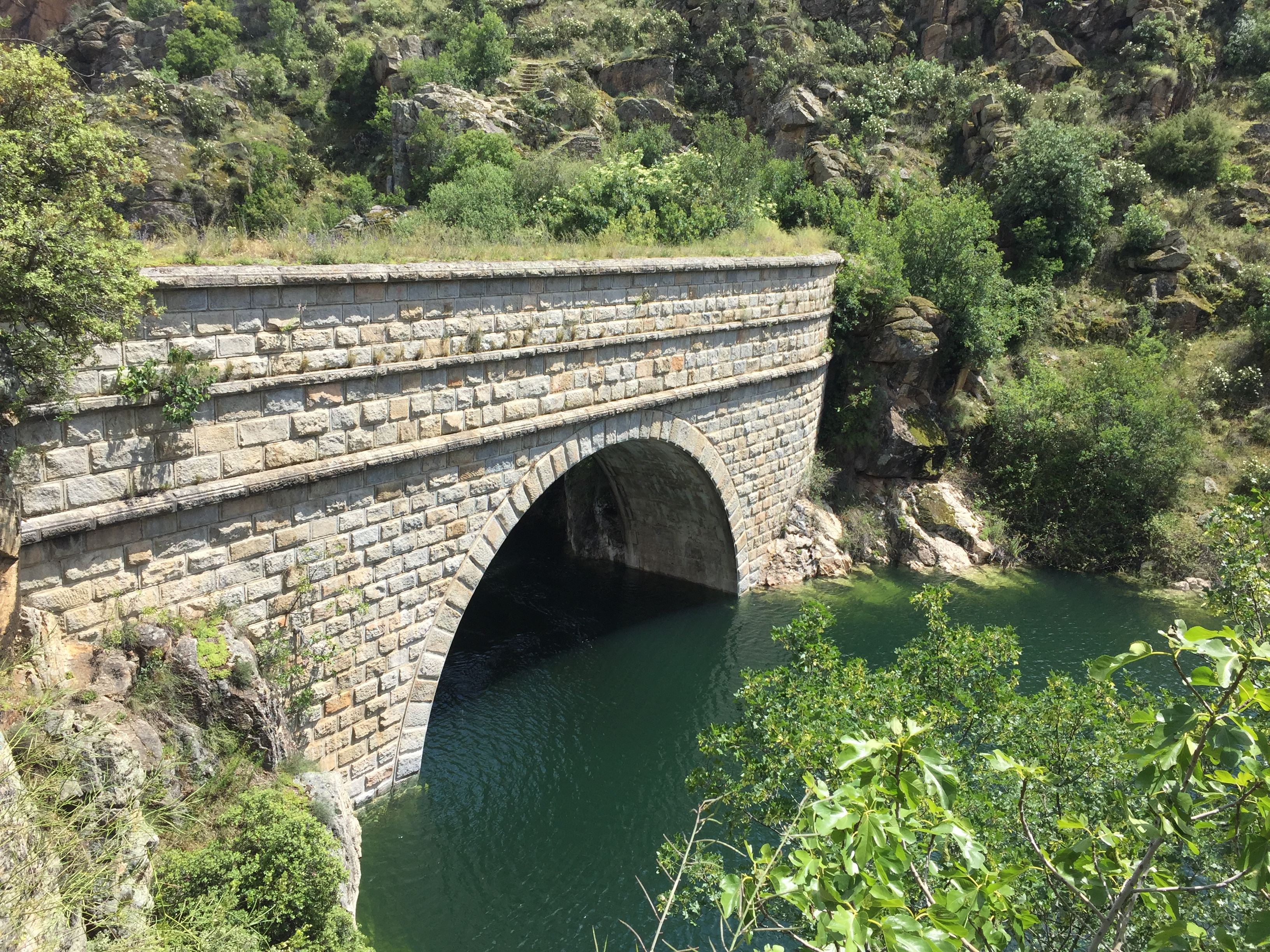 Acueducto del Canal de El Villar, sobre el río Lozoya (retenido en el Embalse de El Atazar). Comunidad de Madrid, España.